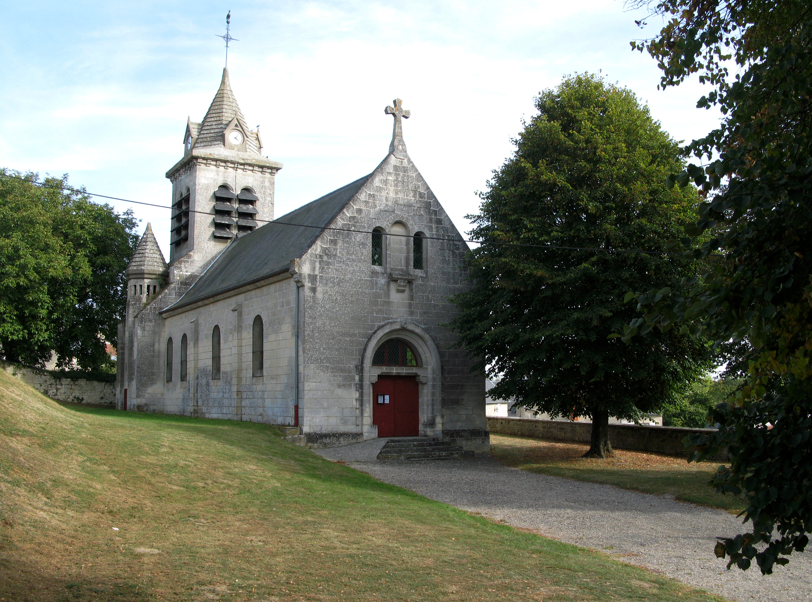 Tartiers (Aisne, France) - L'église. . .